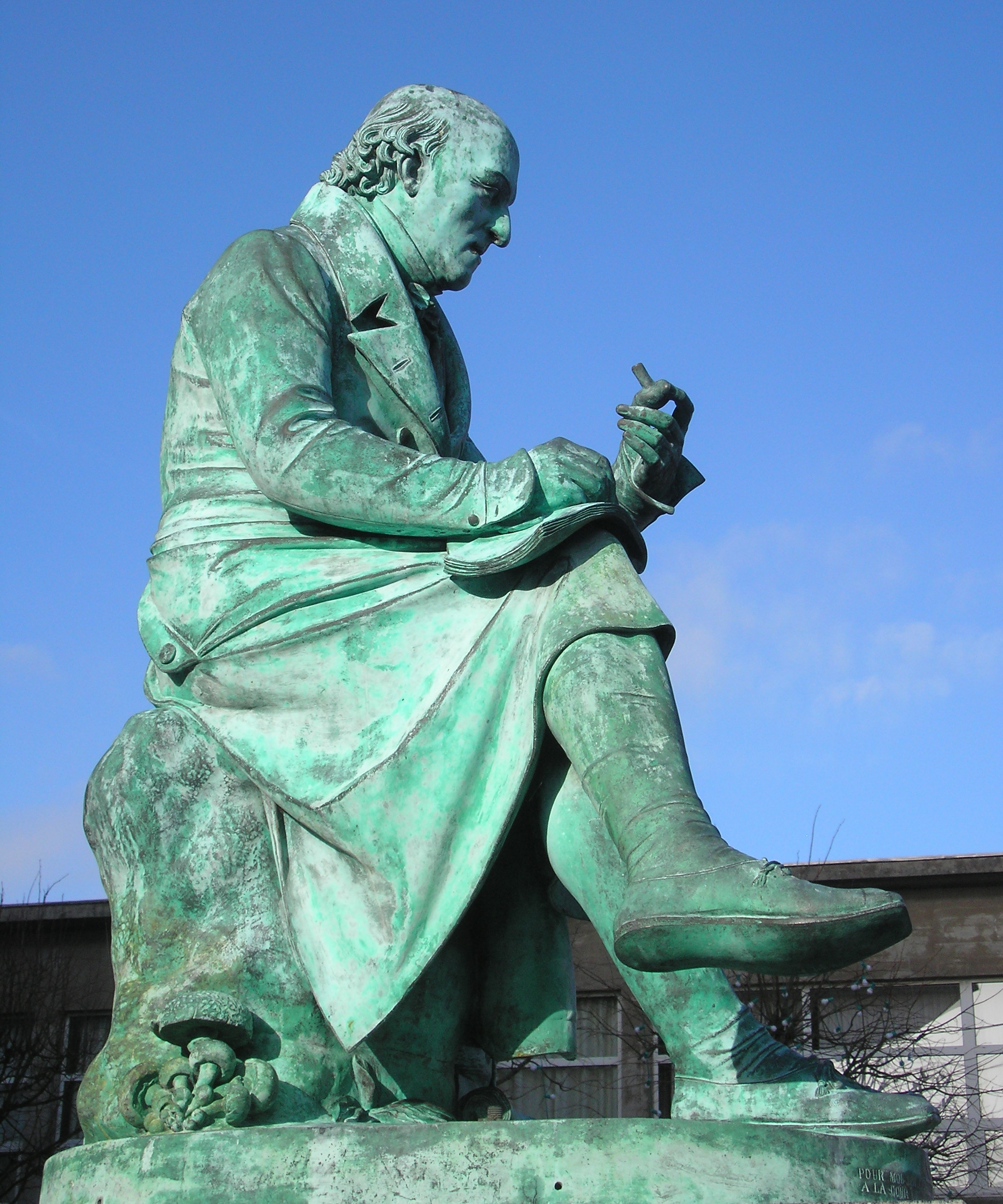 Joseph de Bay (sculpteur français) et Quesnel (fondeur français): Monument en hommage à René-Richard Castel, 1835 (salon 1836), fonte de fer; statue offerte en 1868 à la ville de Vire, Calvados, France.